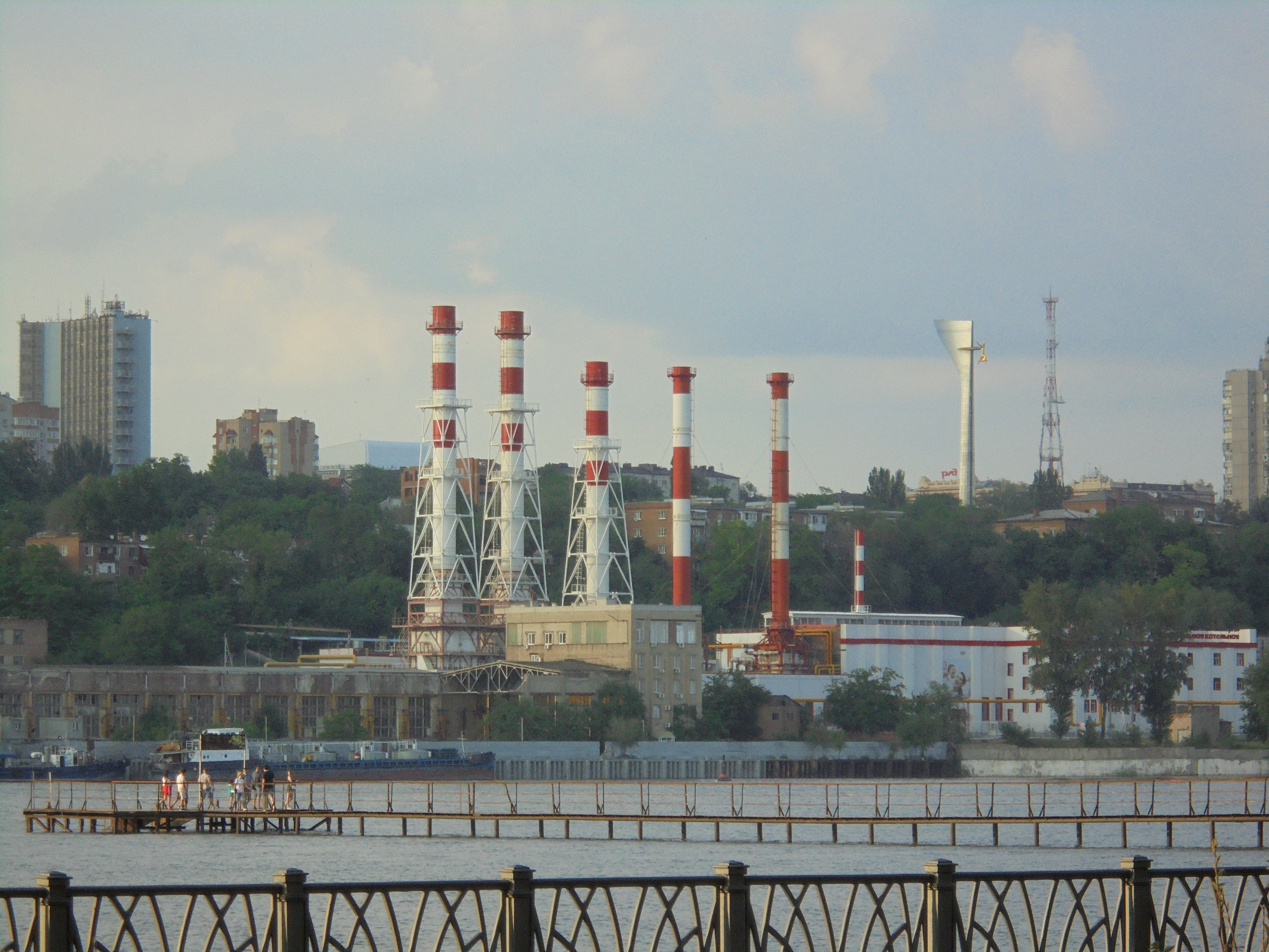 Центральная котельная Ростова-на-Дону.